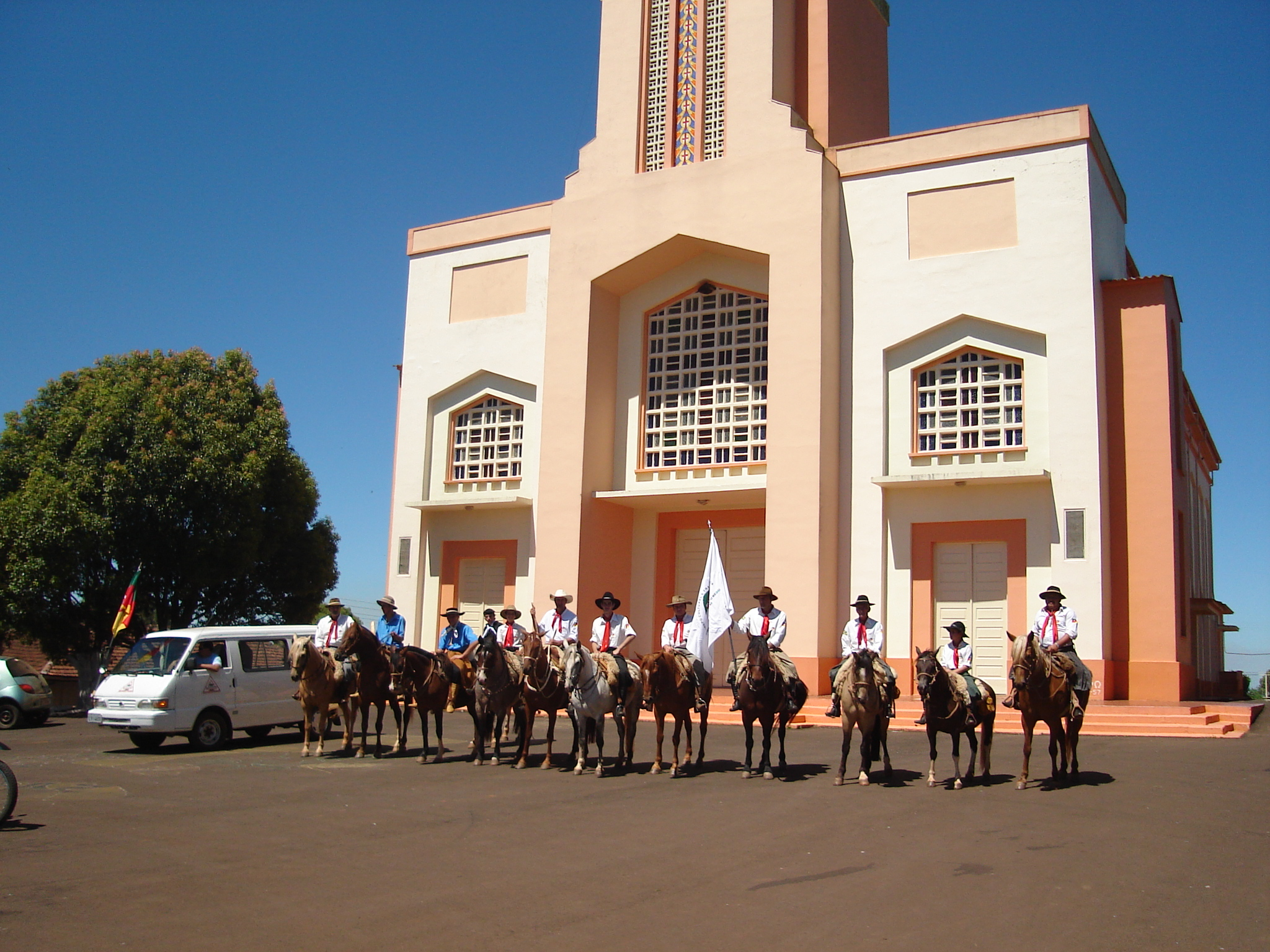 Grupo de Cavaleiros em frente a igreja de Getúlio Vargas (Rio Grande do Sul)